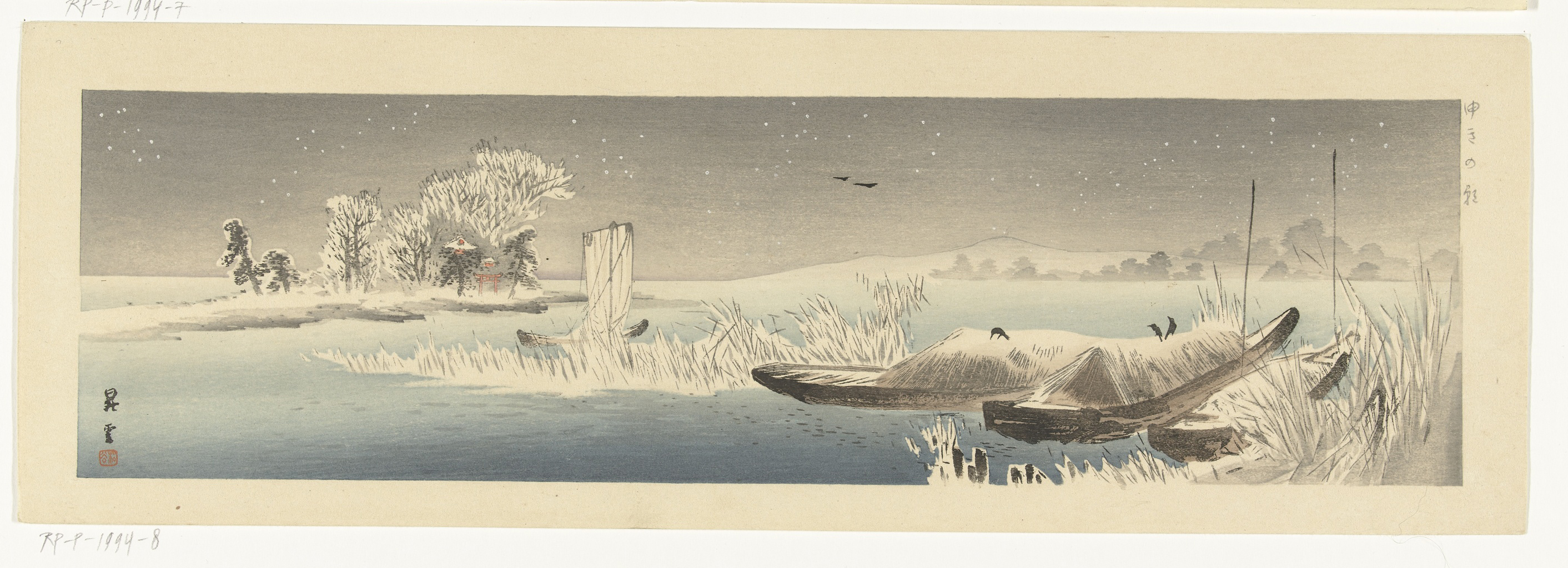 Winters waterlandschap. Rechts op de voorgrond enkele boten waarop zwarte kraaien. Links in de achtergrond een rode tempelpoort. Label Line: mentioned on object Yamamoto Shoun (1870 - 1965), 1900 - 1940, kleurenhoutsnede; lijnblok met kleurblokken Collection: prenten; Japan (collectie)